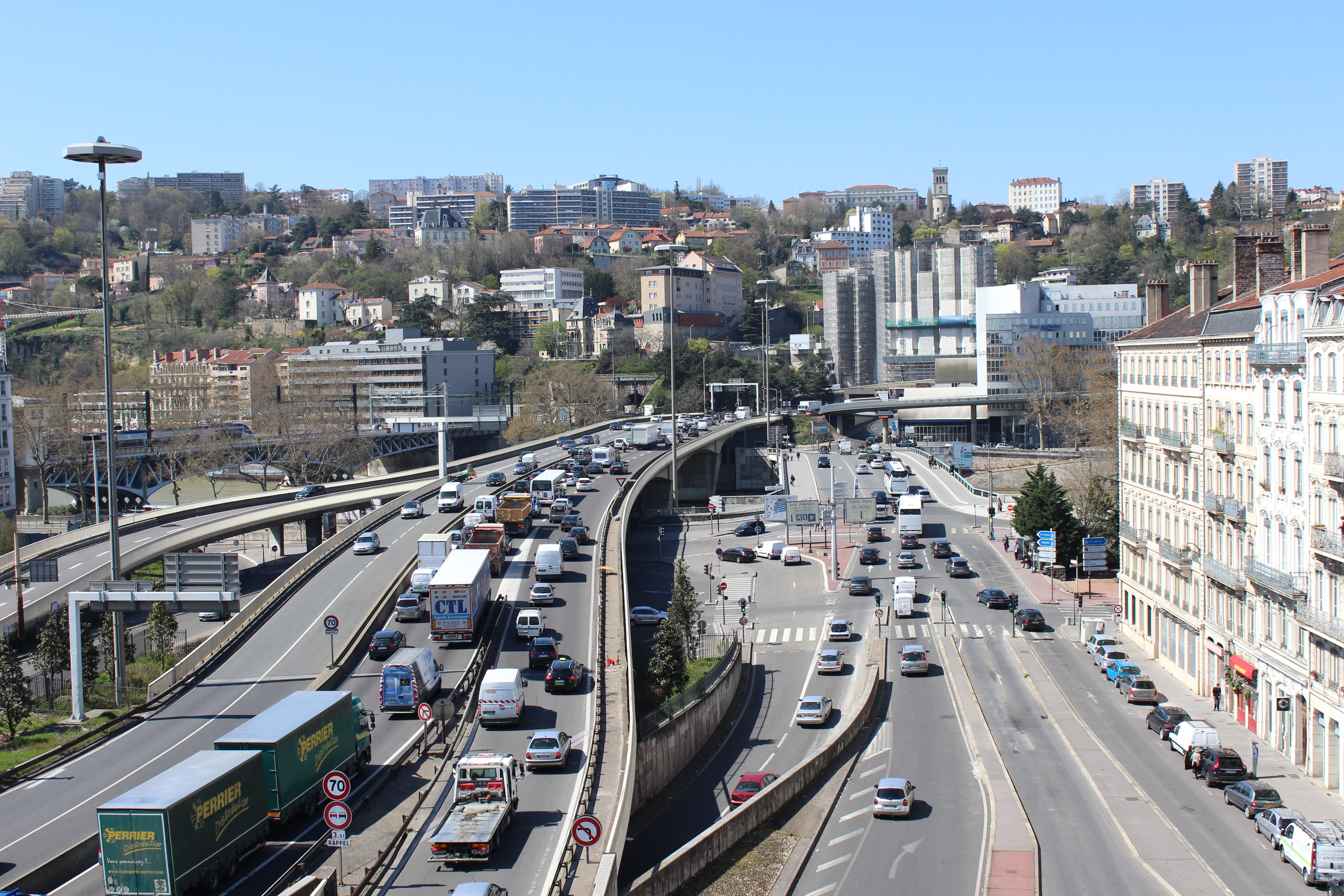 À Lyon, A6 et Pont Kitchener, en direction du tunnel de Fourvière.